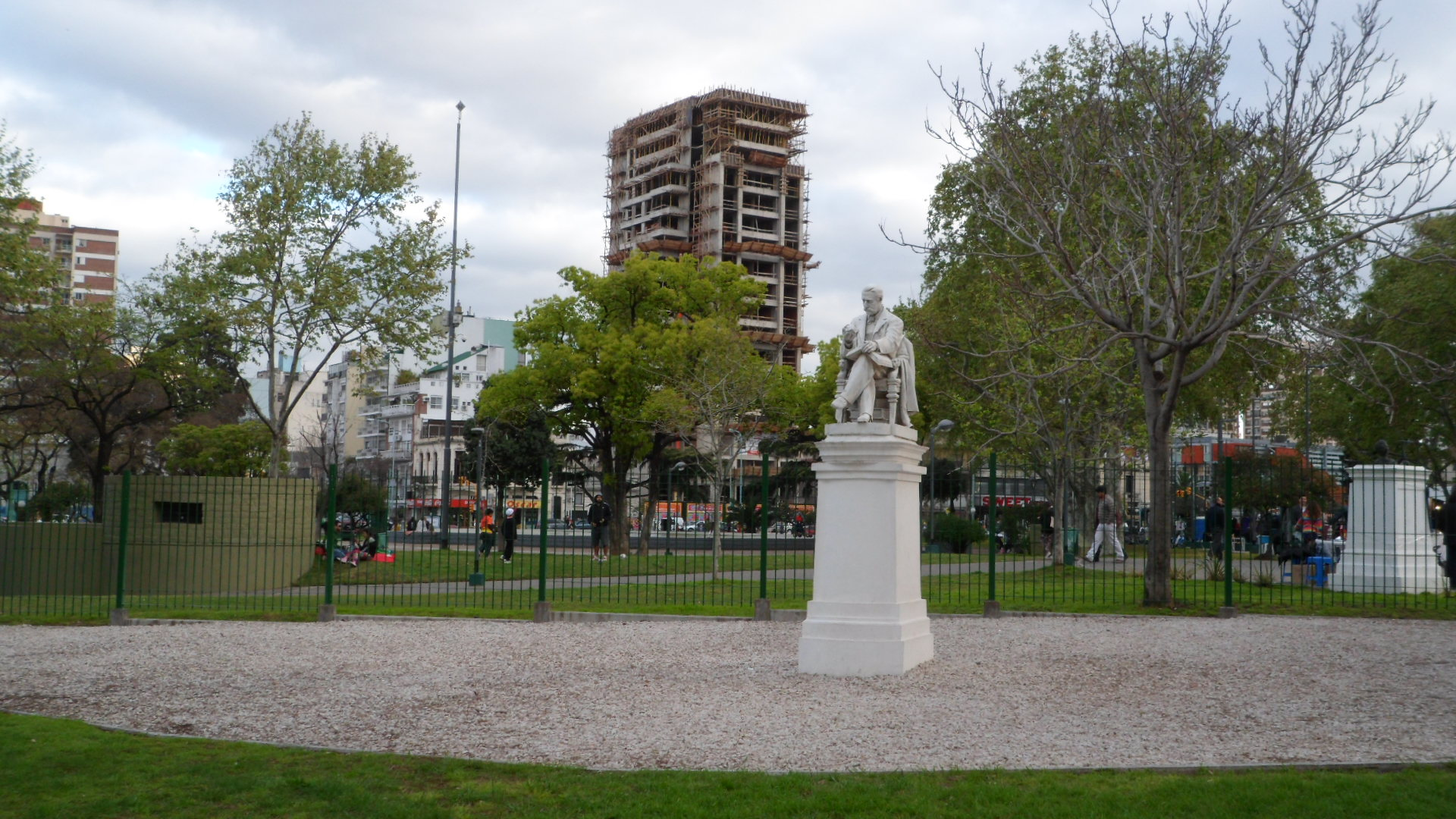 Homenaje a German Burmeister, Parque Centenario